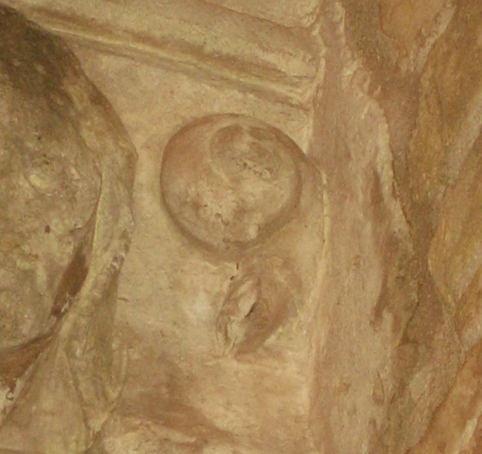 Singolare lumaca scolpita sul portale della chiesa di Sant'Agostino ad Atri (1420).